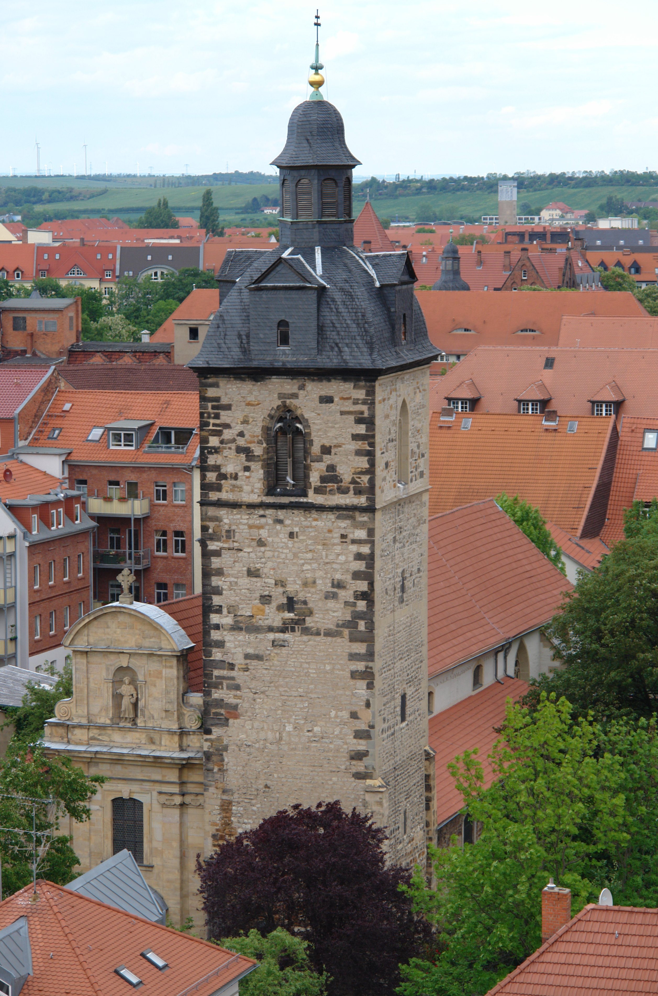 Schottenkirche (errichtet zwischen 1140 und 1200), in der Schottenstraße in Erfurt